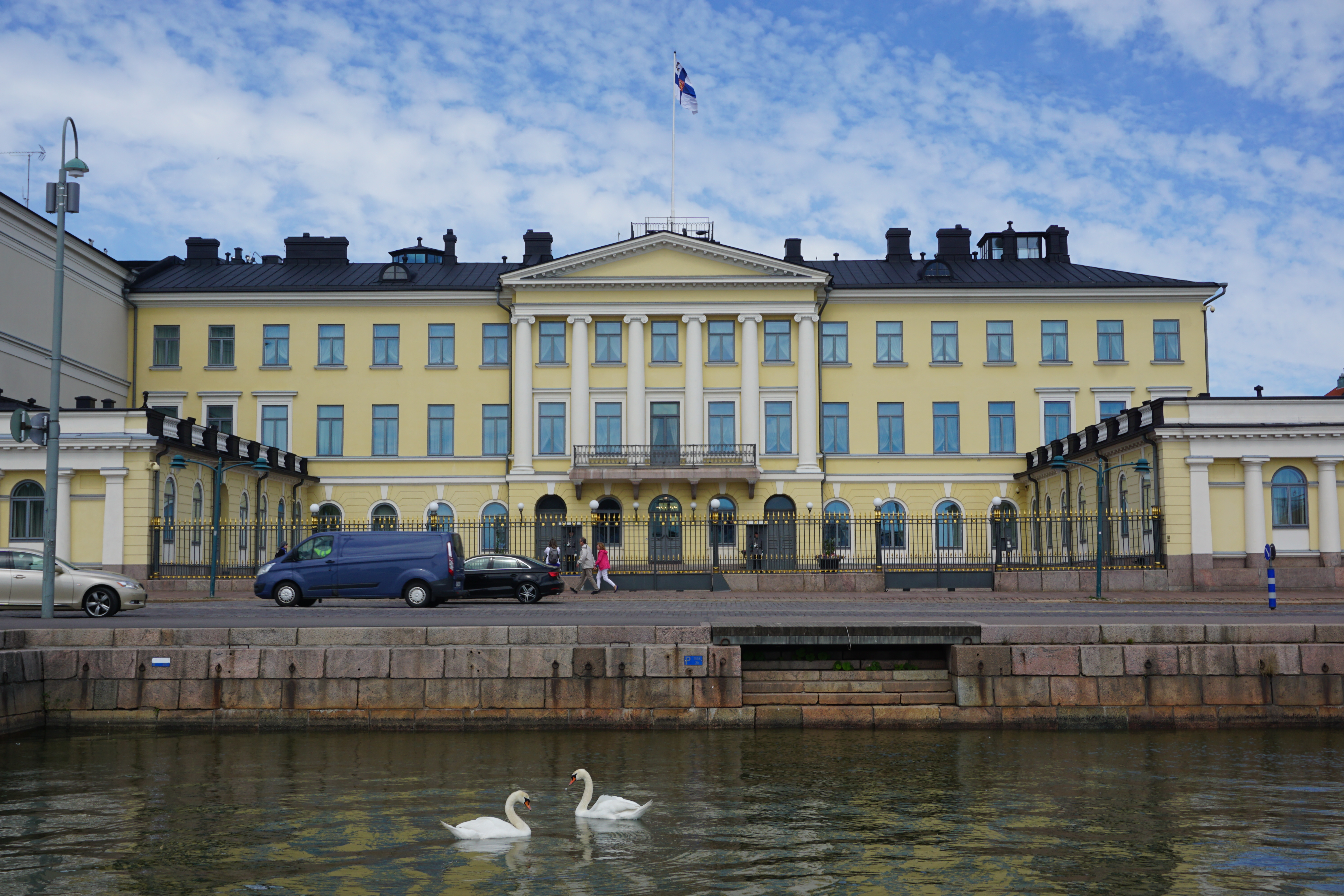 Presidentinlinna